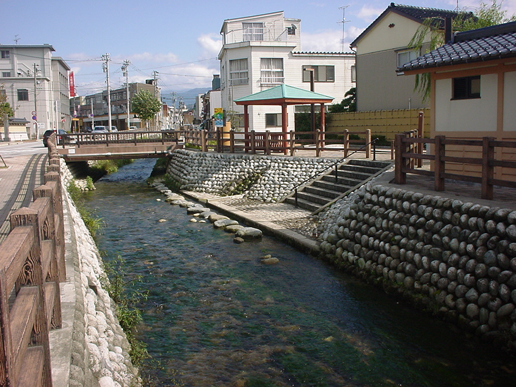 Kamo River in Toyama, Japan. ja: 鴨川（富山県魚津市中央通り 大泉寺橋（だいせんじはし）より上流方向撮影）